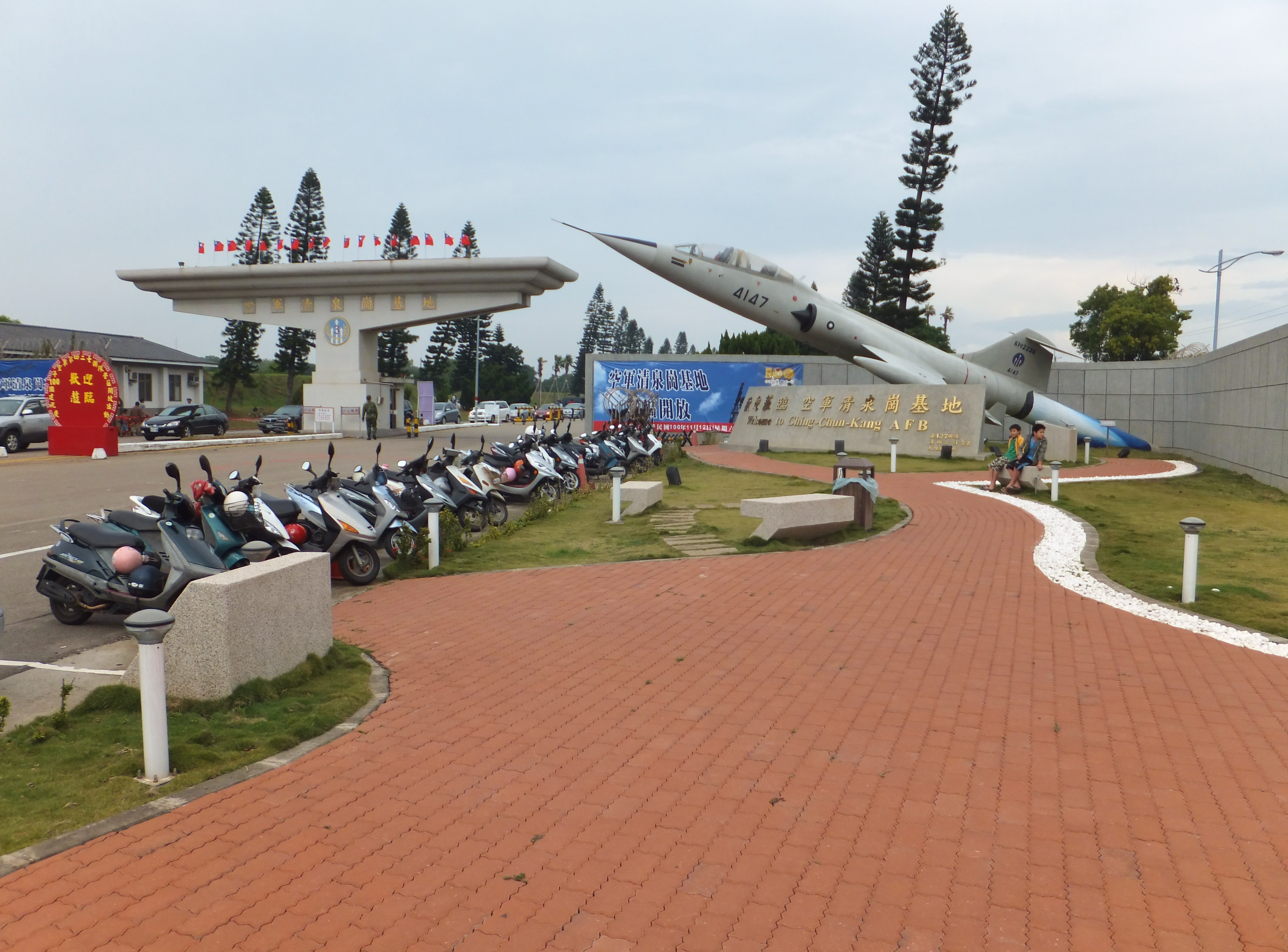 臺中市大雅區空軍清泉崗基地大營門外的F-104星式戰鬥機公園，2009年6月30日竣工。